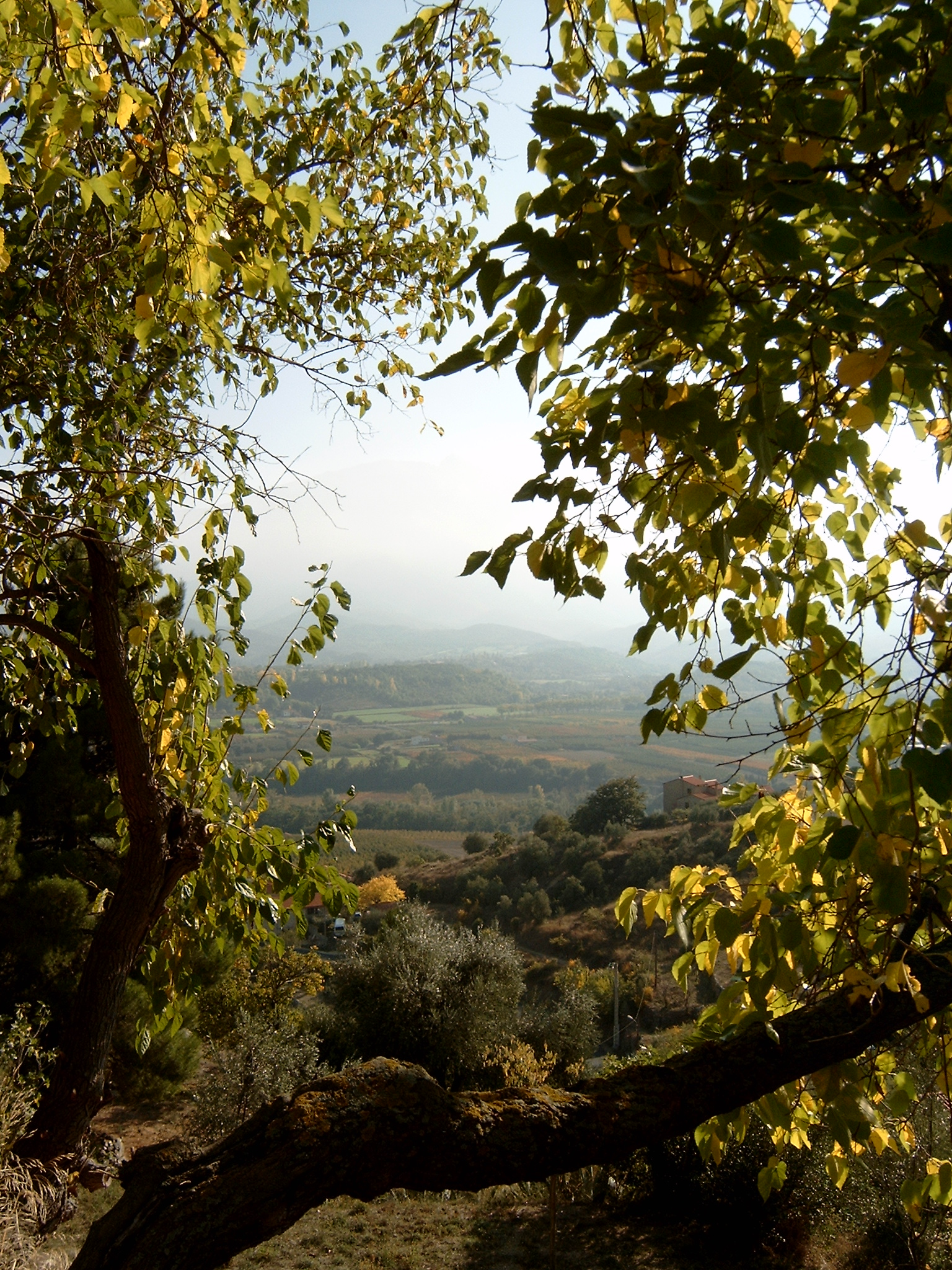 Le village d'Eus (Pyrénées-Orientales, France).